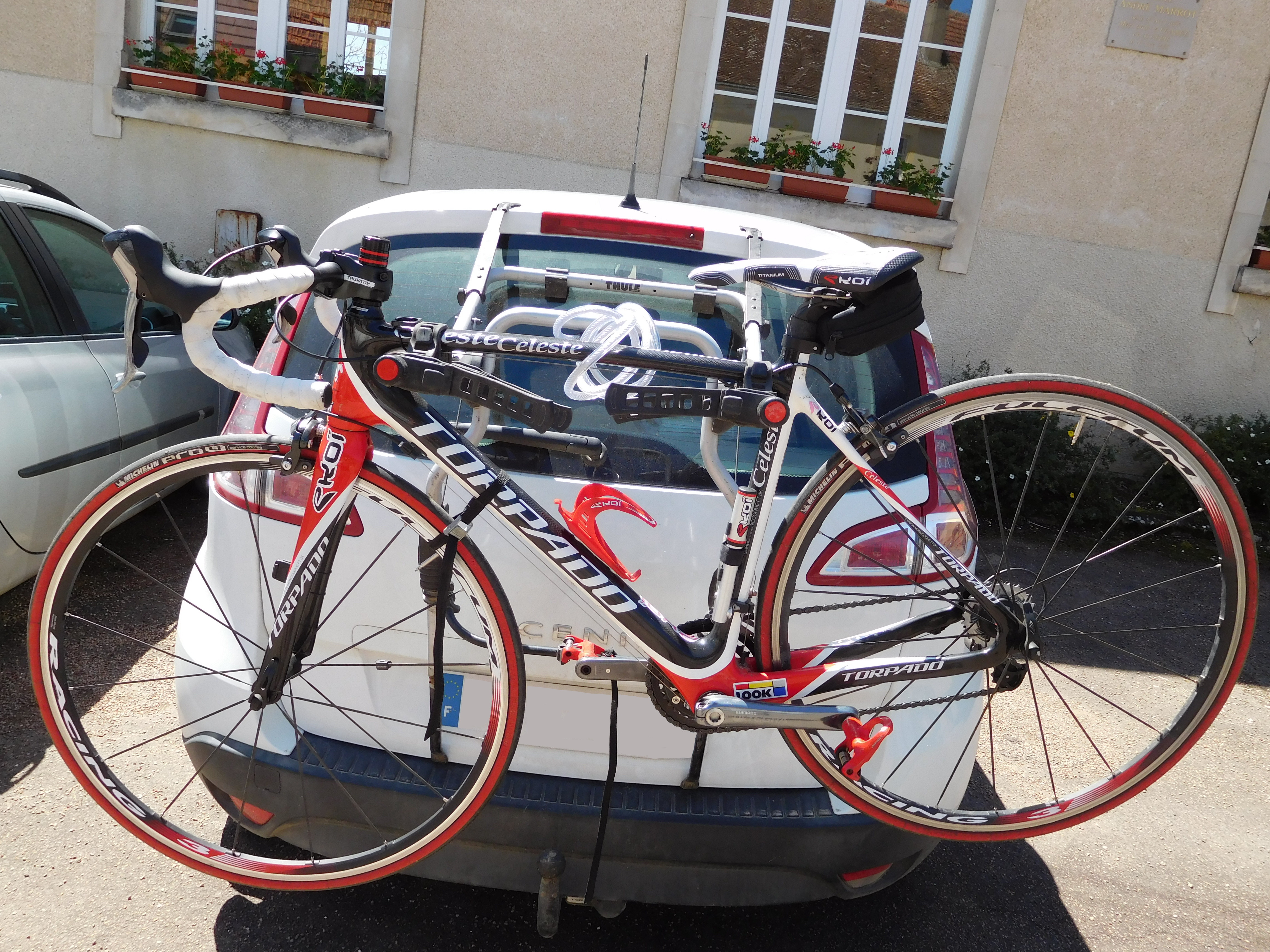 Vélo de course Torpado Celeste, « Carbon monocoque FT 3K » ; fixé à l'arrière d'une Renault Scénic III. Manivelles et dérailleur AR : Shimano Ultegra Pédales : LOOK Selle (modèle Titanium), pompe et porte-bidon : Ekoï Potence : Truvativ Roues Fulcrum Racing 3 Pneus : Michelin Pro4 Service course Porte-vélo : Thule